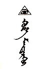 Монгол: м